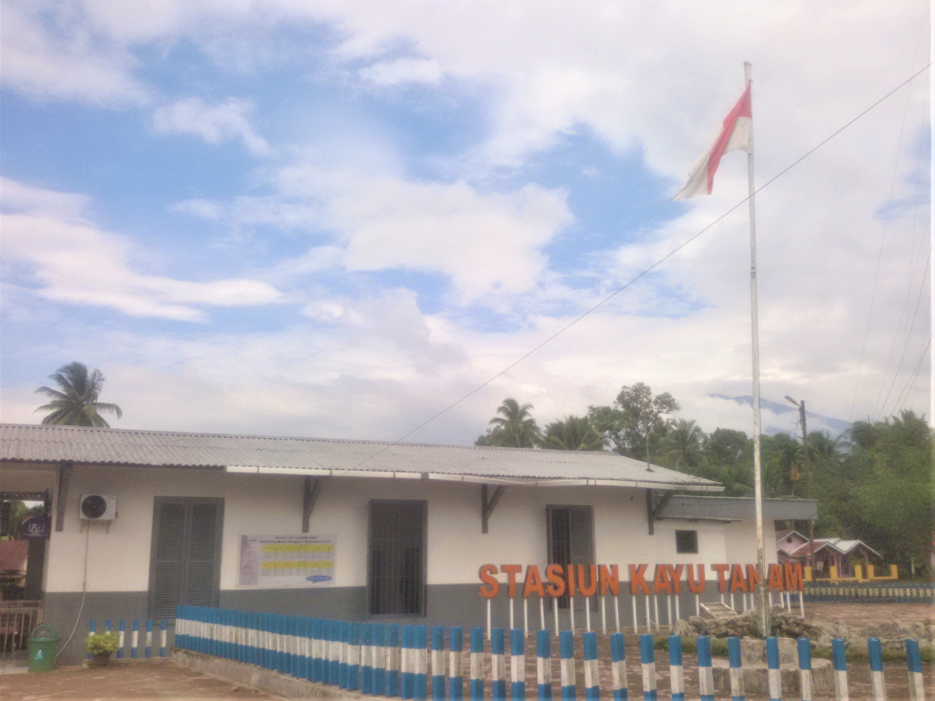 Tampak depan Stasiun Kayu Tanam